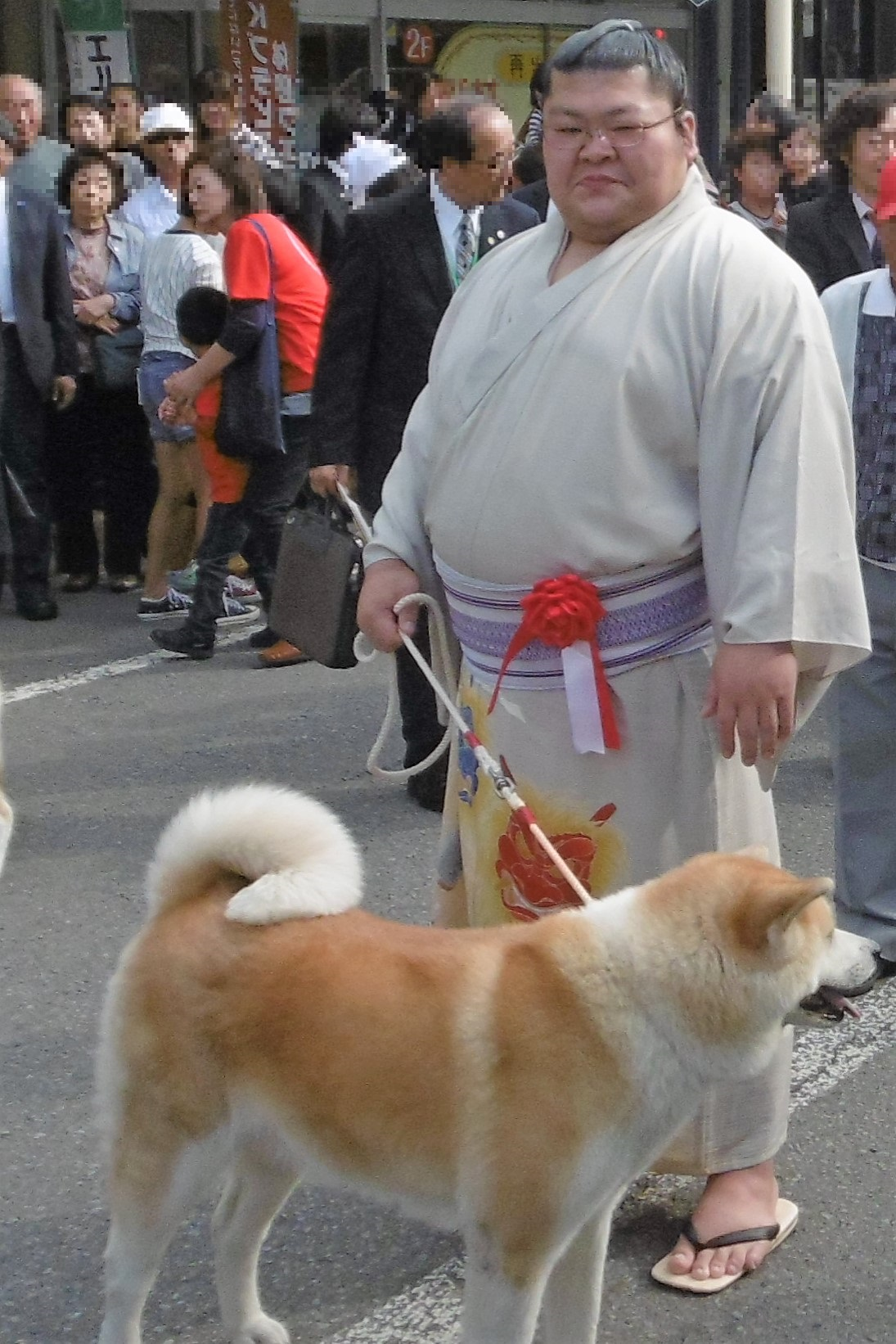 豪風関県民栄誉章受章祝賀パレード（秋田県北秋田市 鷹巣銀座通り商店街）